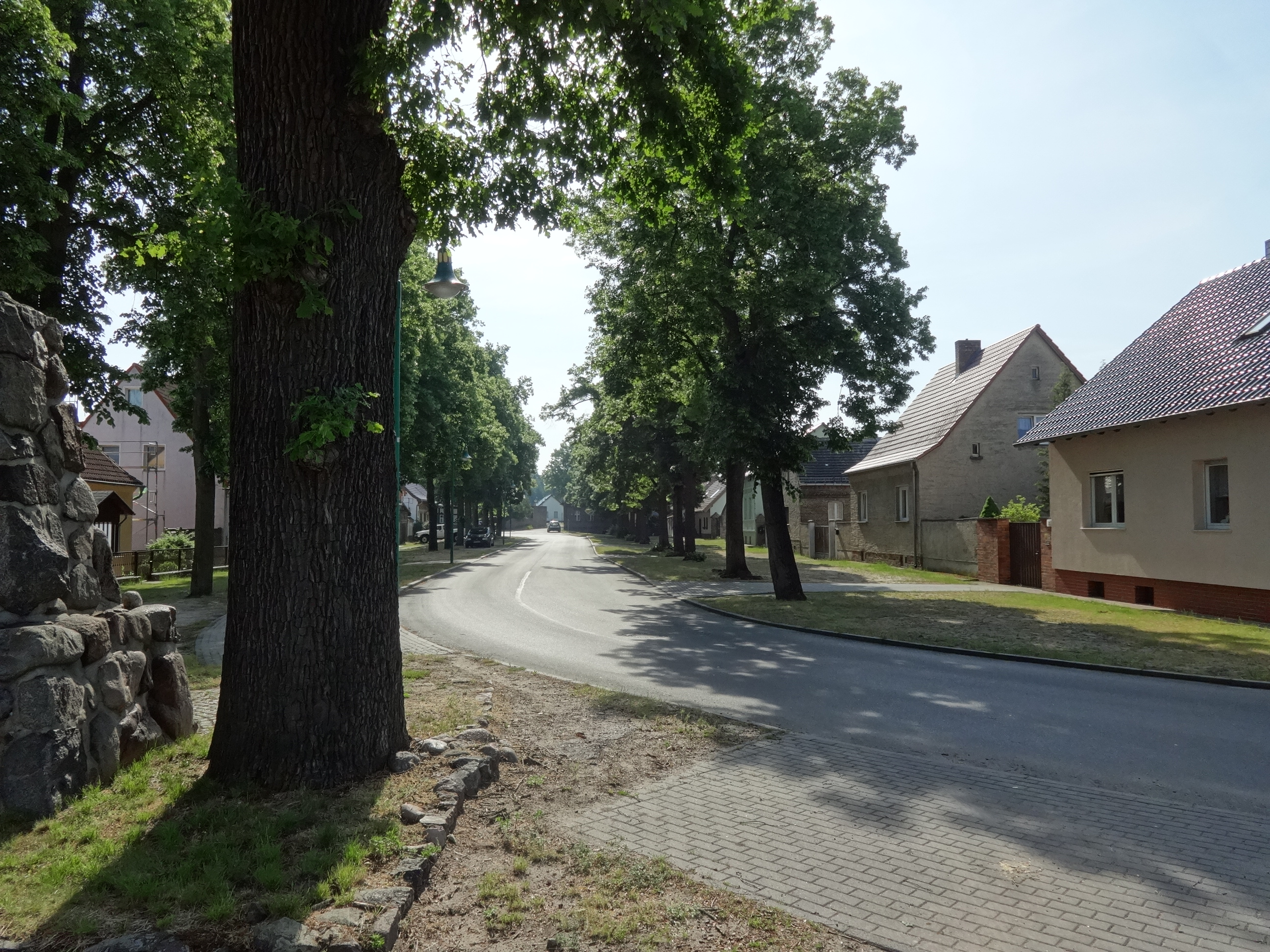 Dorfstraße in Lindenbrück, ein Ortsteil der Gemeinde Zossen in Brandenburg, Blick nach Norden